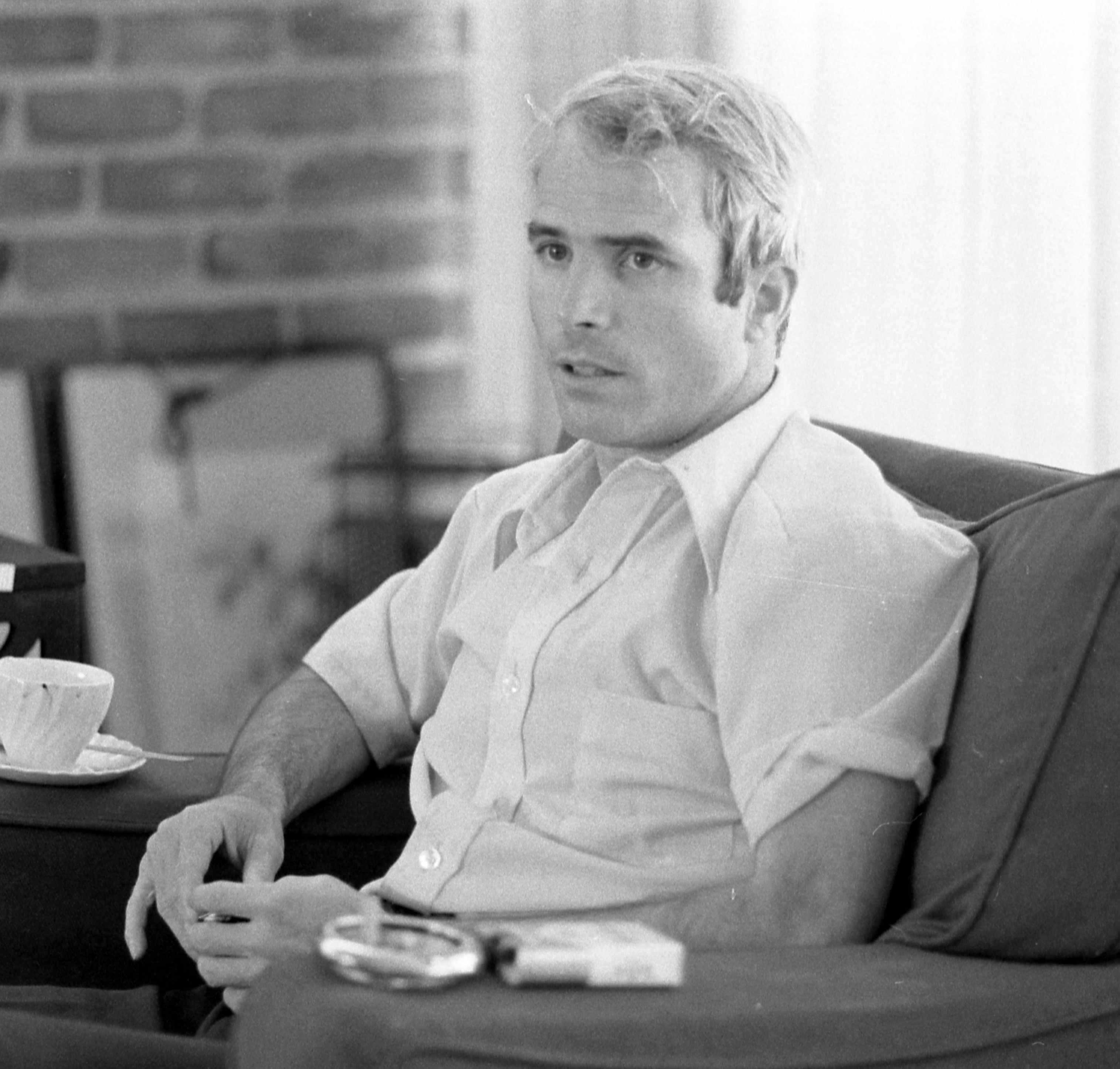 John McCain being interviewed.